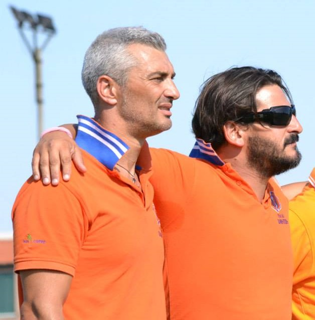 Esposito e Lupo, coachs delle Lobsters